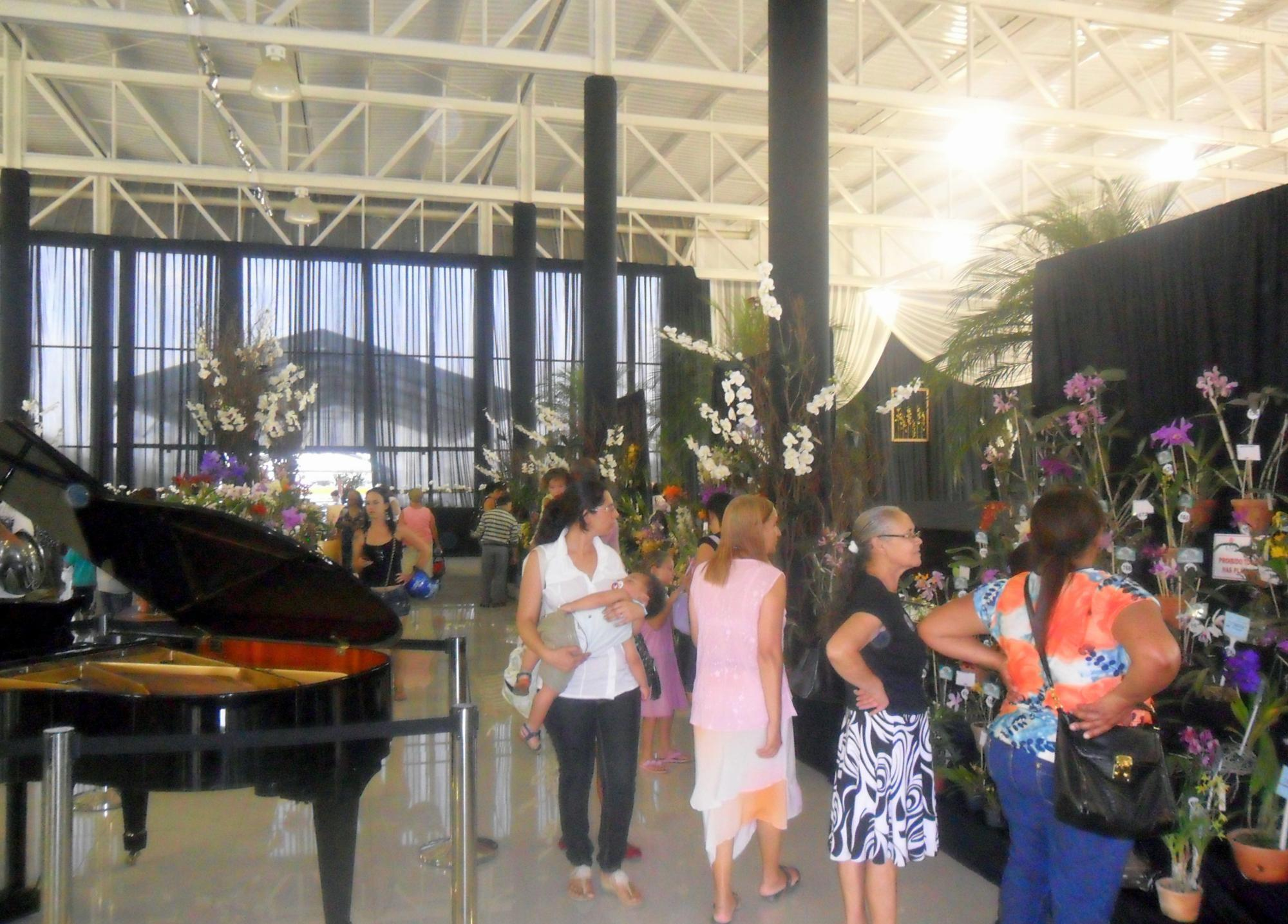 Exposição de Orquídeas e Plantas Ornamentais de Poá 2012